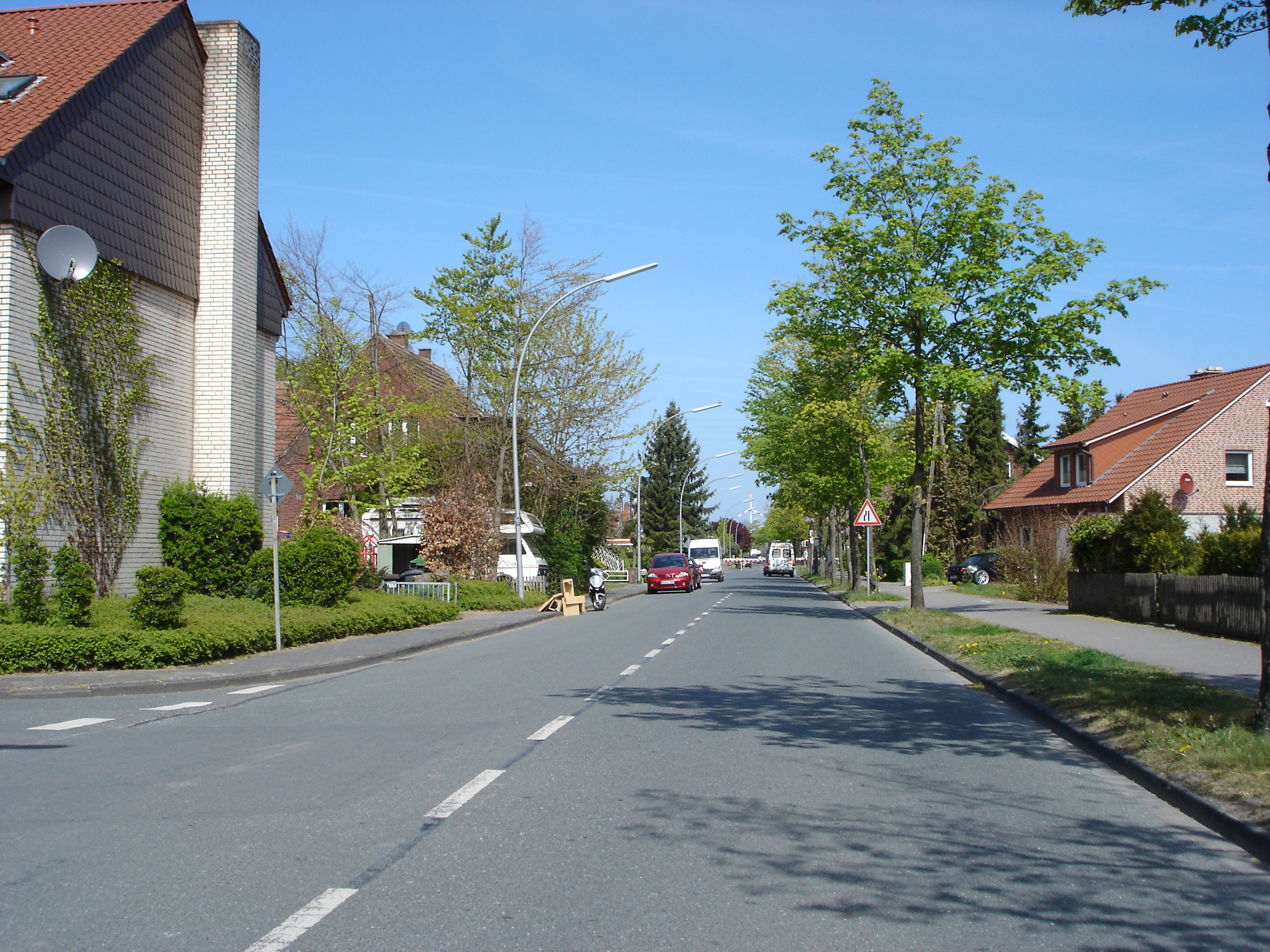 Blick in nördlicher Richtung in der Hägerstraße in Münster-Häger